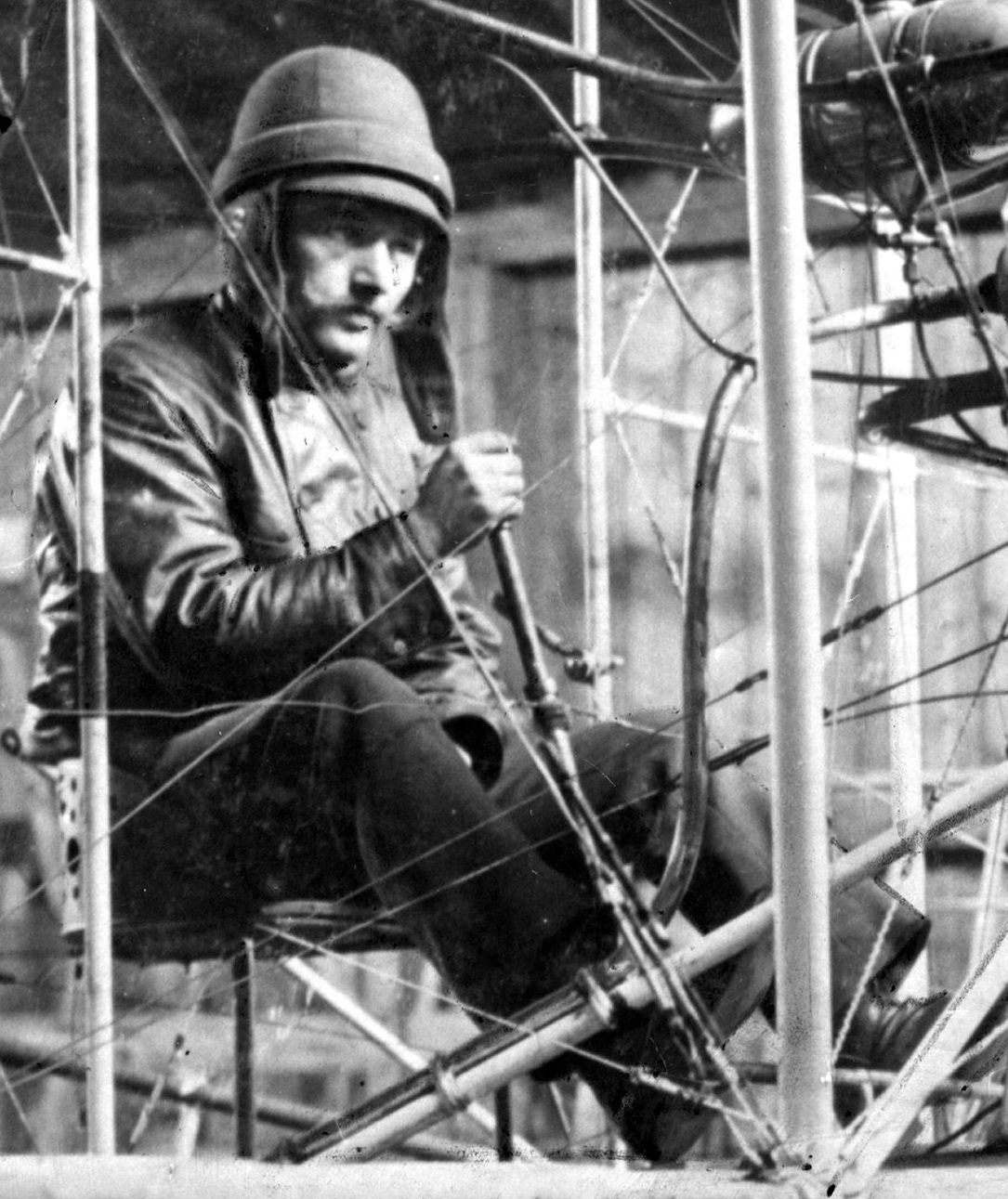 Czesław Zbierański za sterami swego samolotu